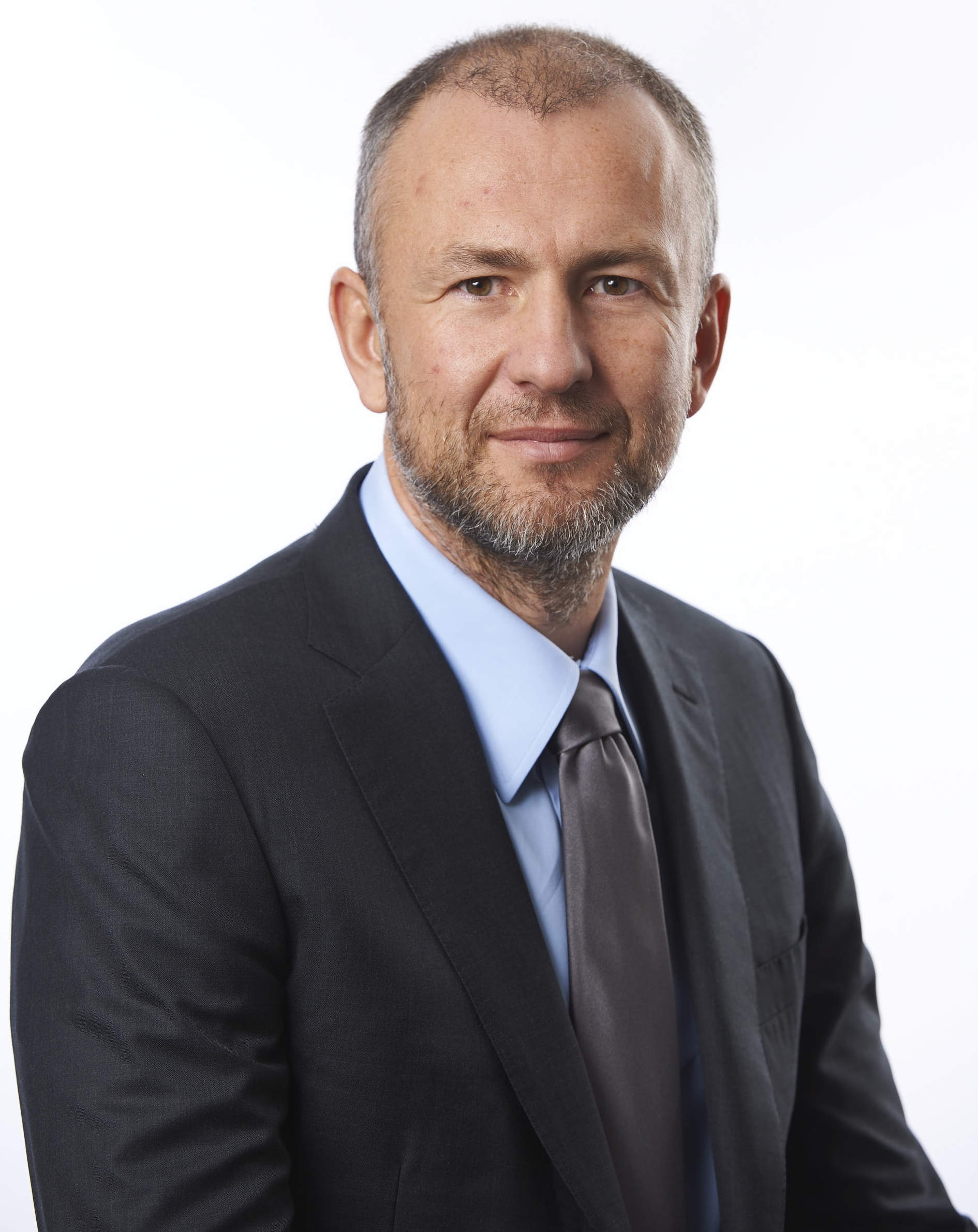 Российский бизнесмен, промышленник и меценат Андрей Мельниченко, Москва, 2017 год